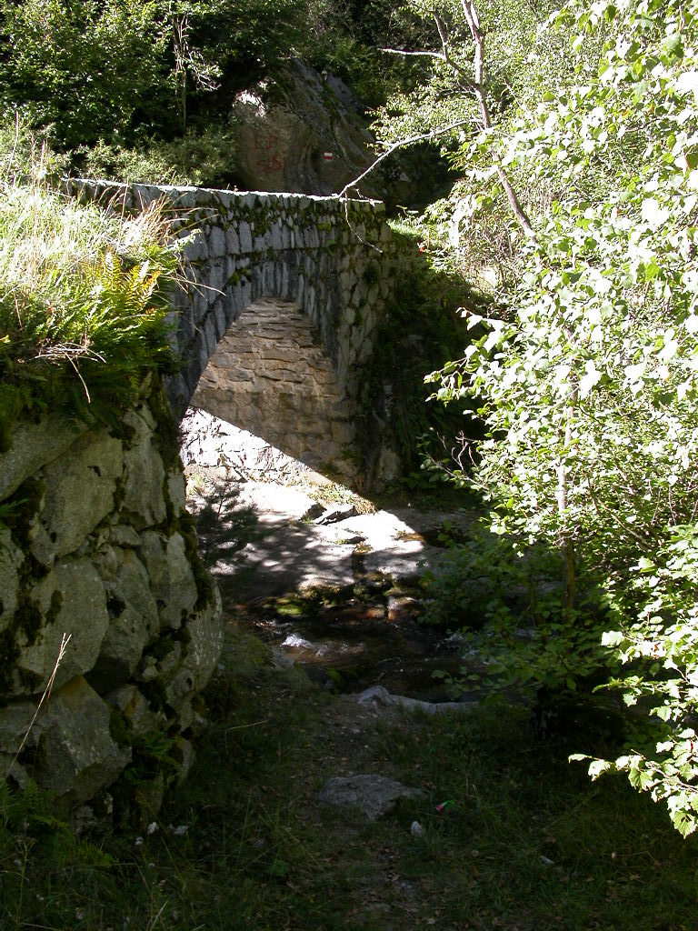 Pont de Sassanat a l'entrada de la Vall de Madriu